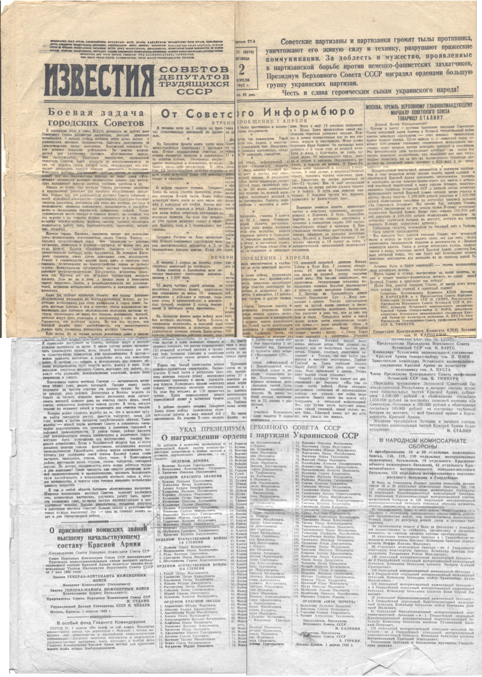 Первая полоса газеты Известия 1943 г.